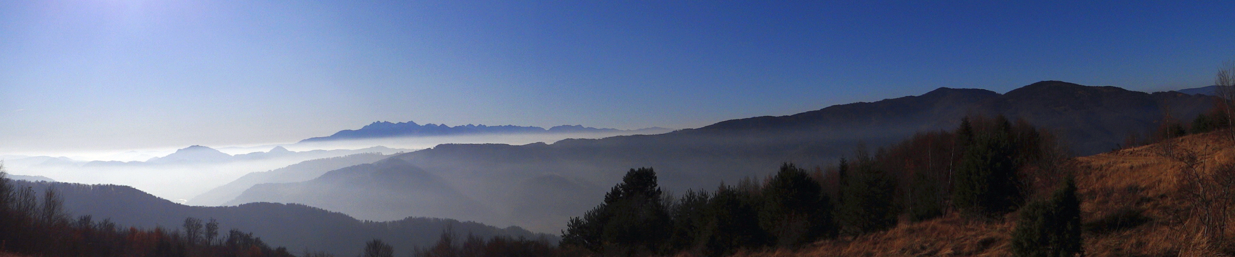 Panorama na Pieniny, Tatry i Lubań z polany Kolebisko